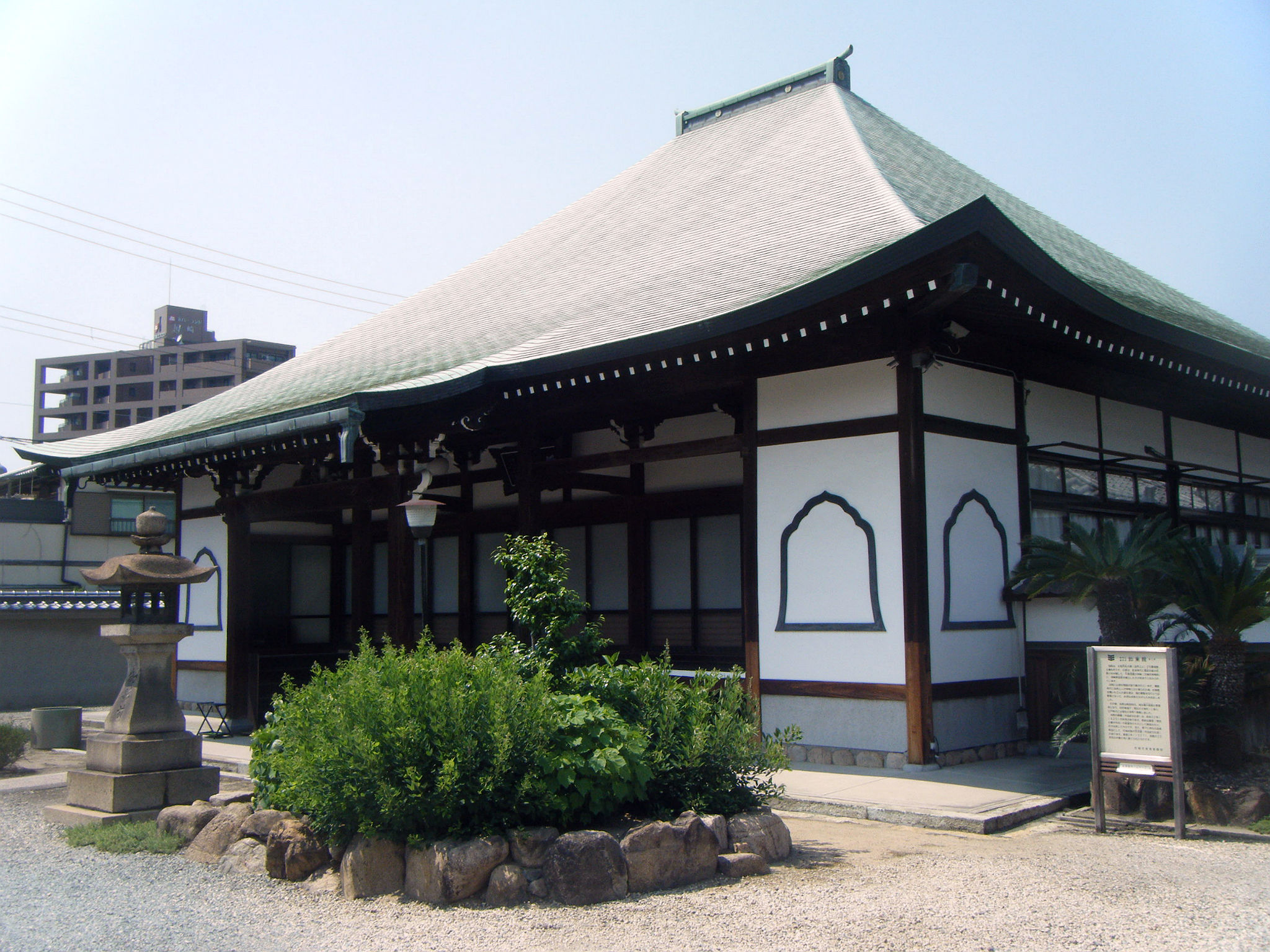 如来院 本堂 兵庫県尼崎市